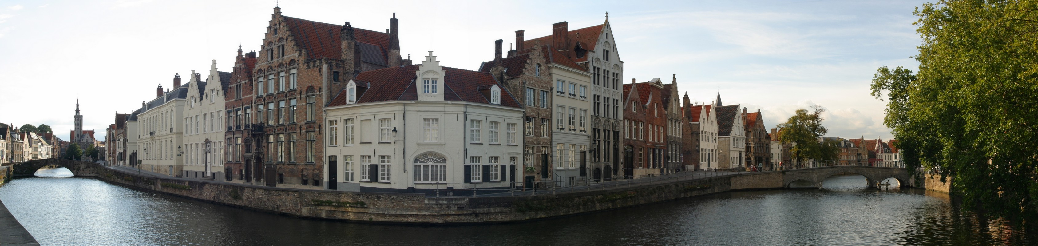 Bruges, Spiegelrei and Langerei